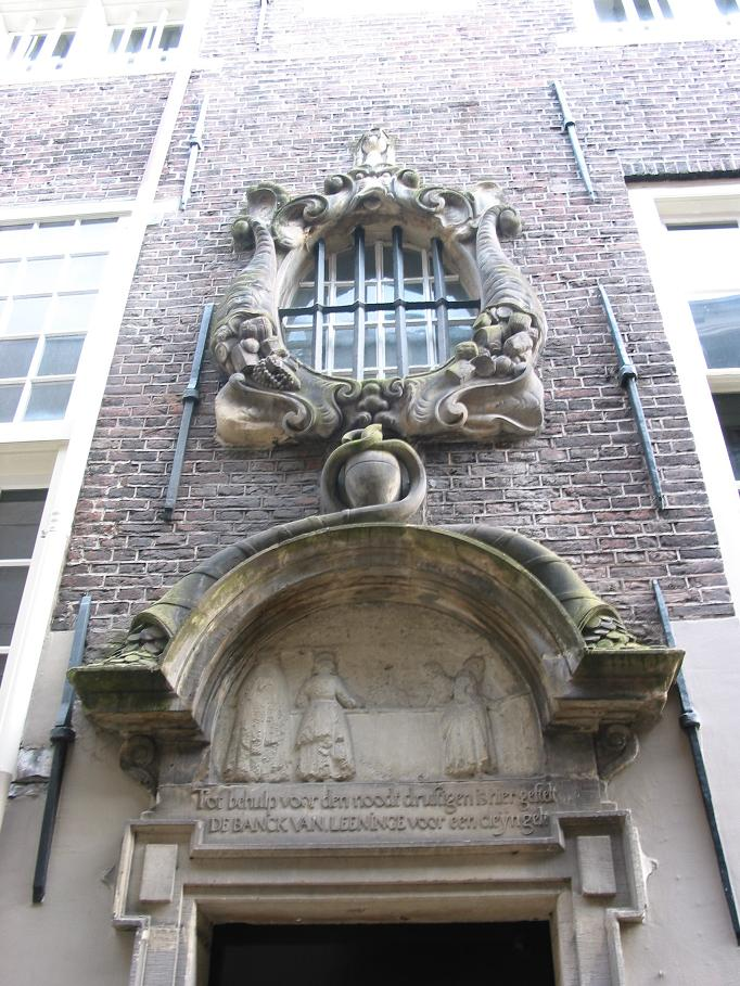 Stadsbank van Lening, Amsterdam, zijingang.